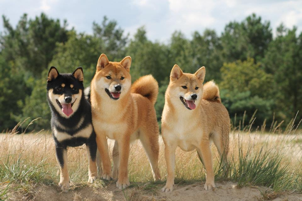 Taro (black and tan, reu) - Chiko (rood, reu) - Ichigo (rood, teef)